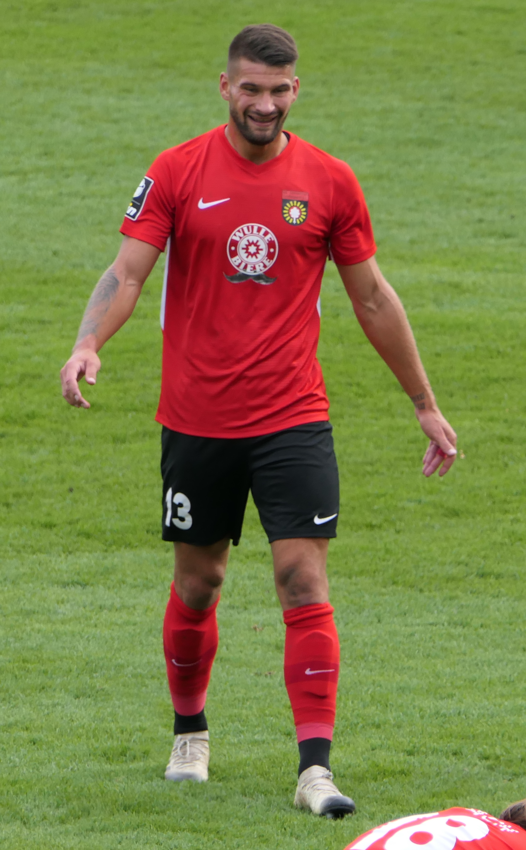 Der Fussballprofi Kai Brünker im Trikot der SG Sonnenhof Großaspach beim Heimspiel gegen Eintracht Braunschweig am 27.10.2019.